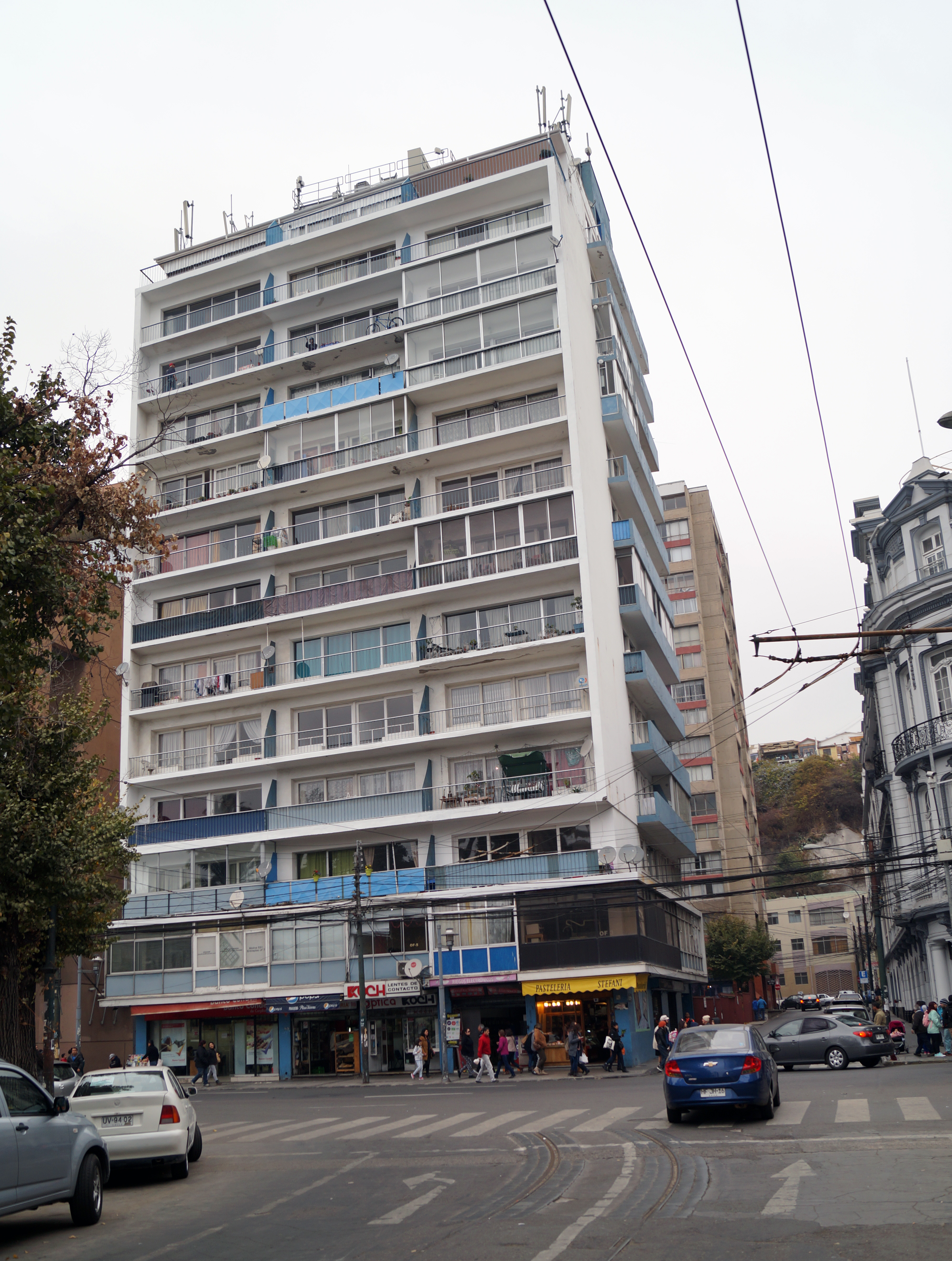 Edificio Fermín Vivaceta Valparaíso, Chile Construido donde antiguamente estaba la Parroquia del Espíritu Santo, frente a la Plaza Victoria.